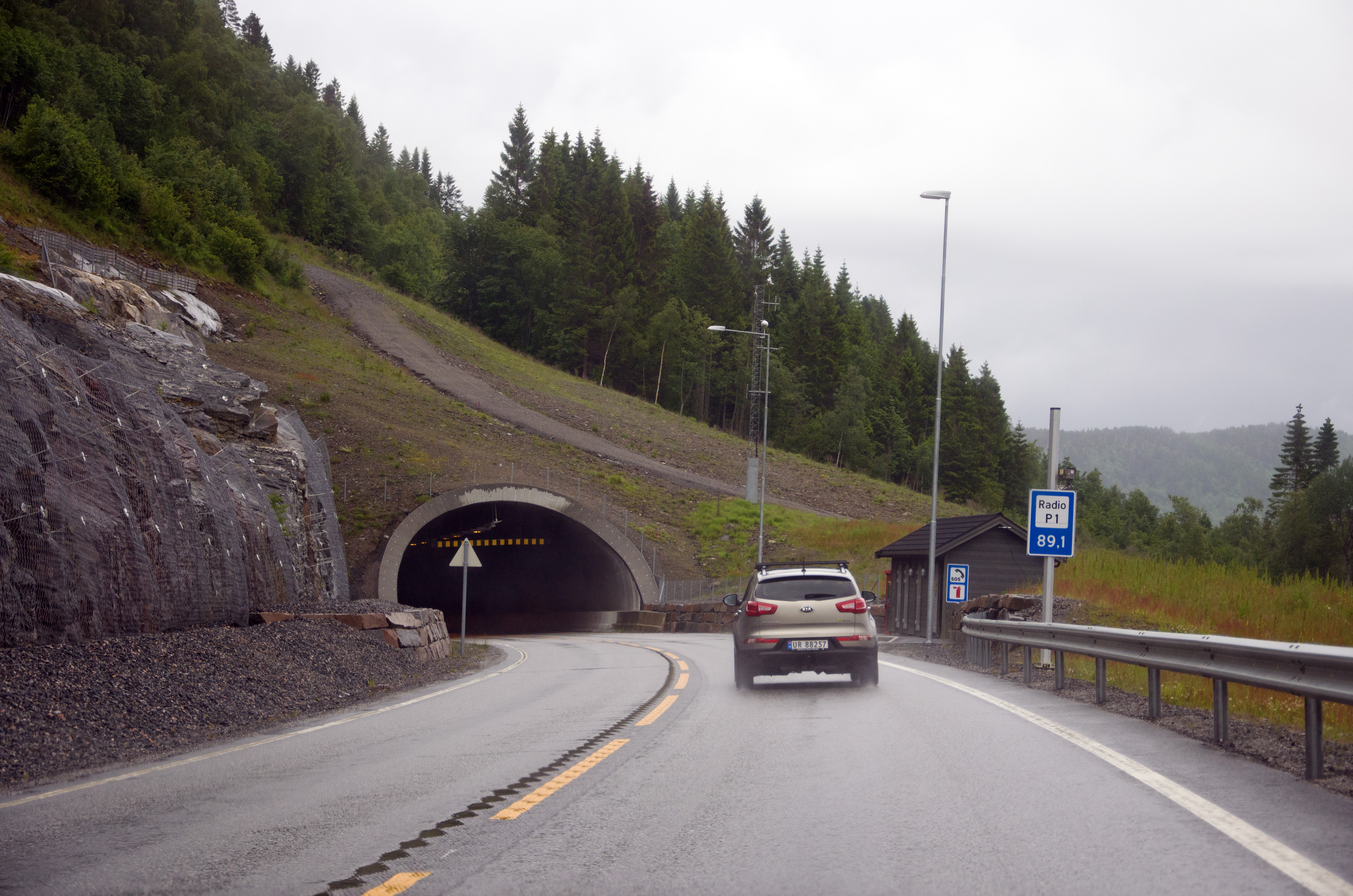 Høgsettunnelen på E39, Gjemnes, Møre og Romsdal